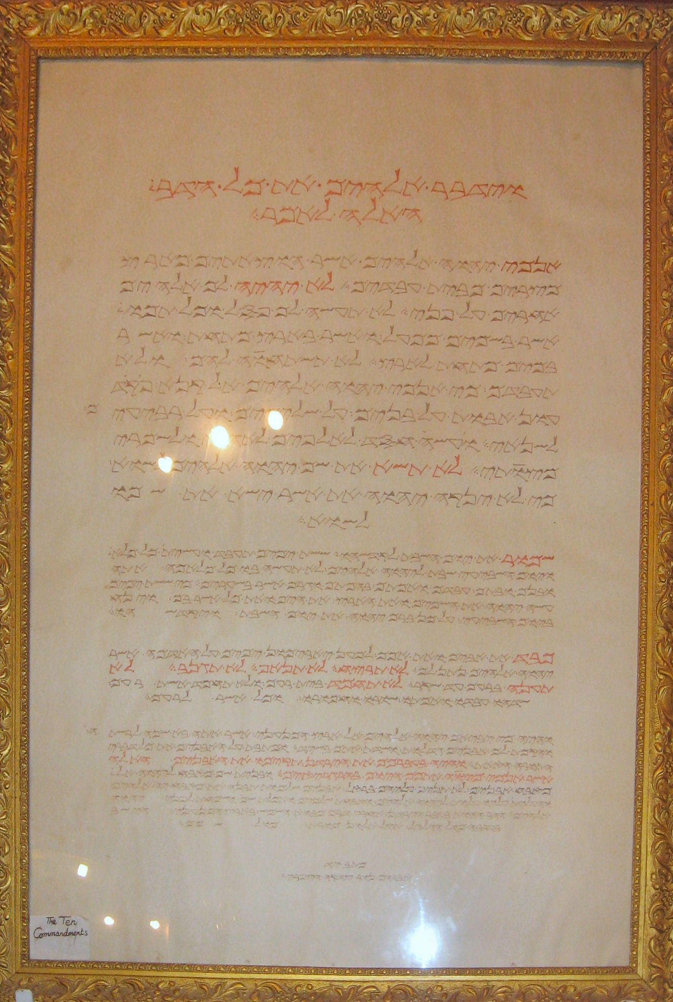 Dieci_comandameti